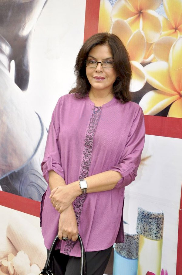 Zeenat Aman at Areopagus spa launch